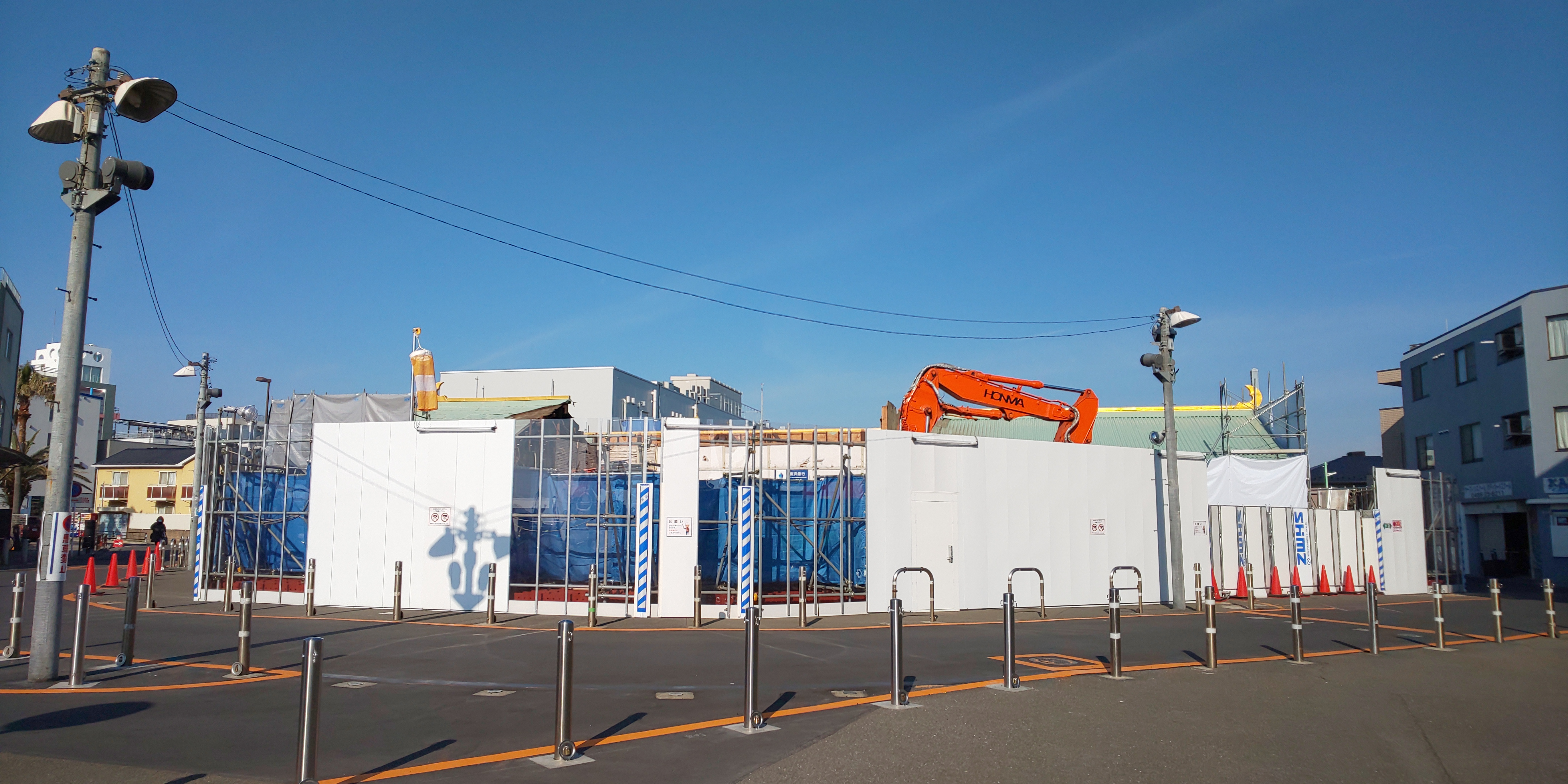 解体工事が進む小田急電鉄江ノ島線片瀬江ノ島駅舎。神奈川県藤沢市にて2019年2月24日撮影